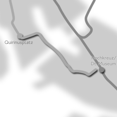 Dieses Bild ist eine Karte der Stadtbahn Bonn beziehungsweise des geplanten Teilstücks von Dottendorf über Friesdorf nach Hochkreuz.